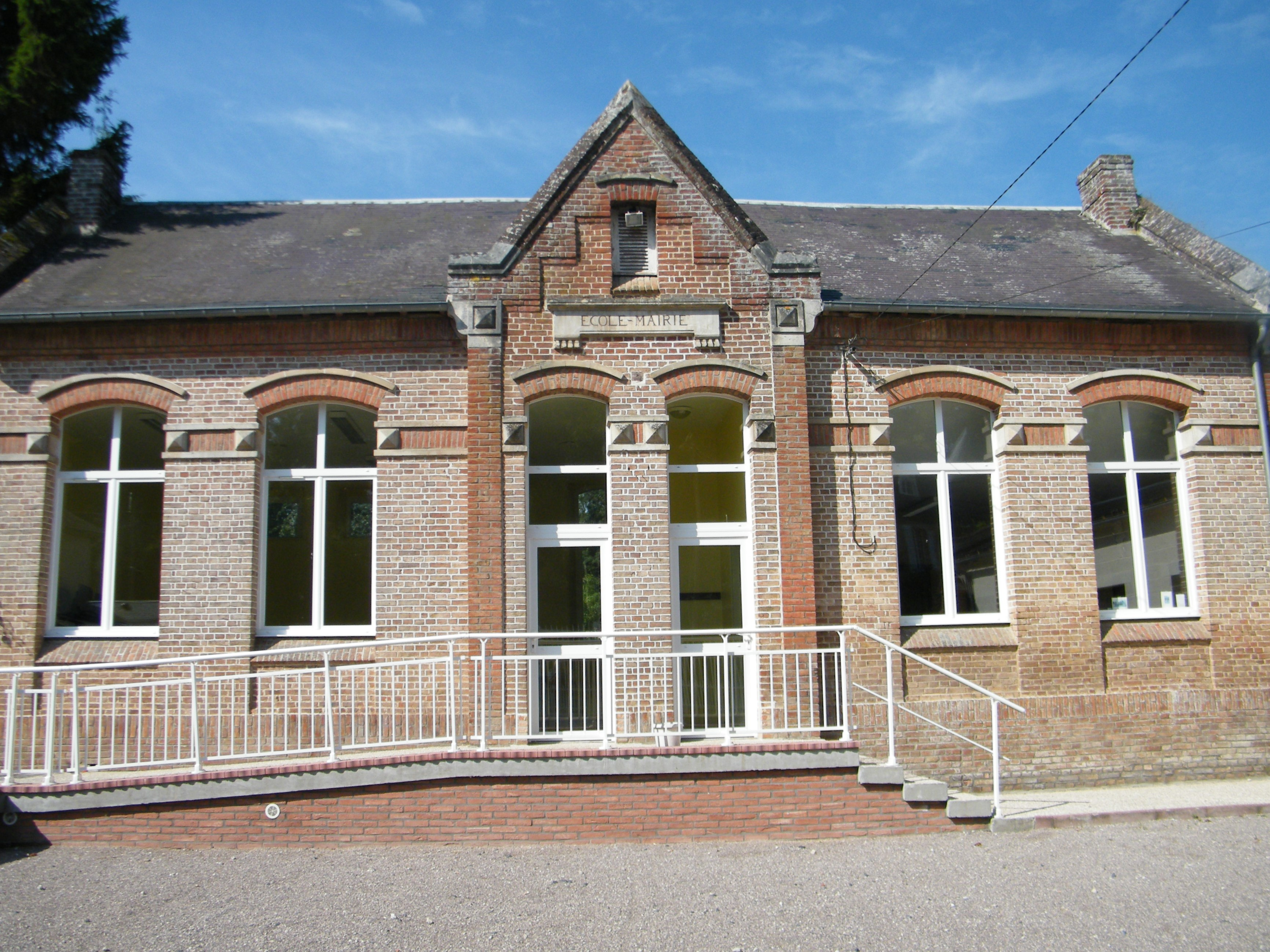 Mairie-école.